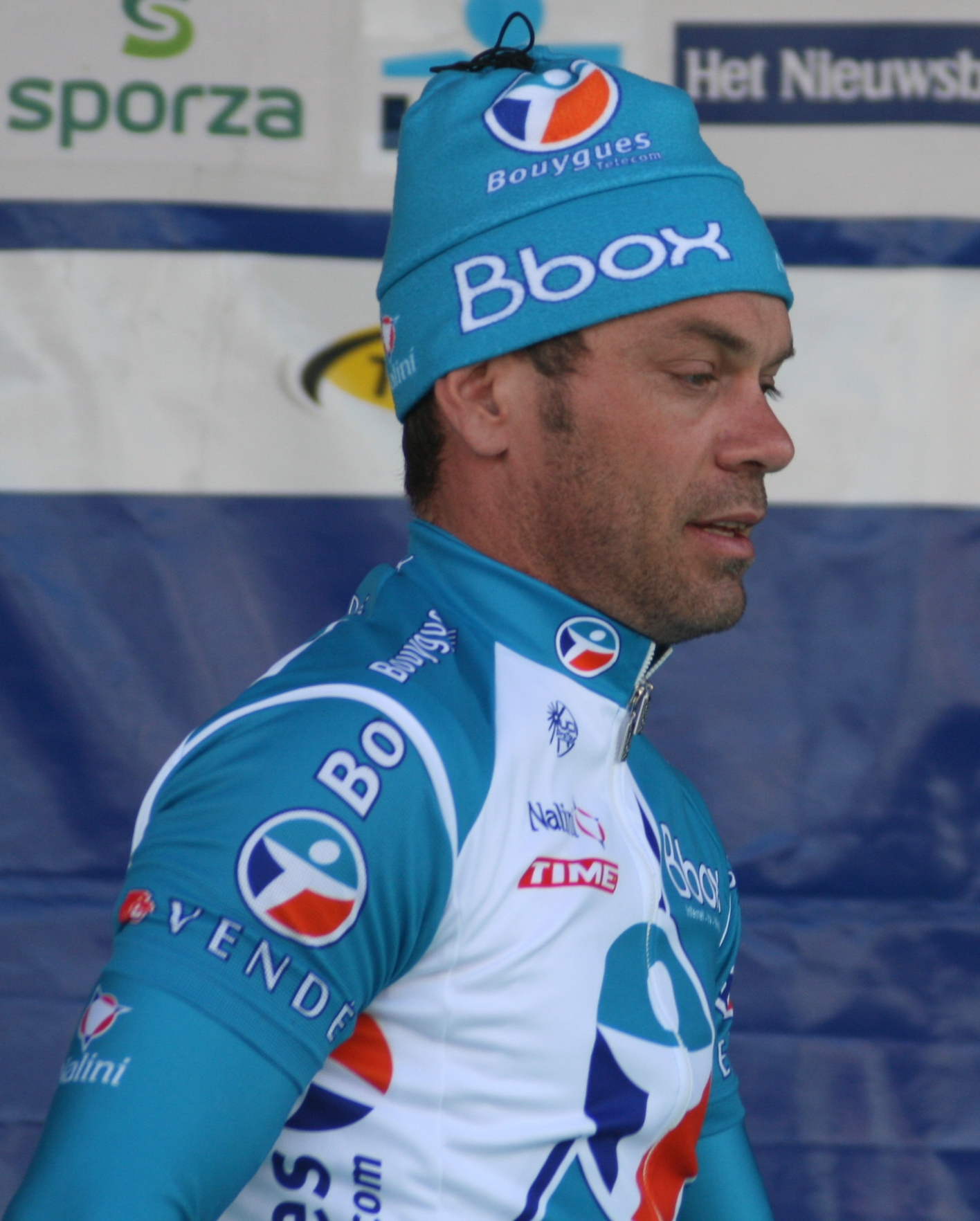 Franck Bouyer, au Grand Prix E3 2009